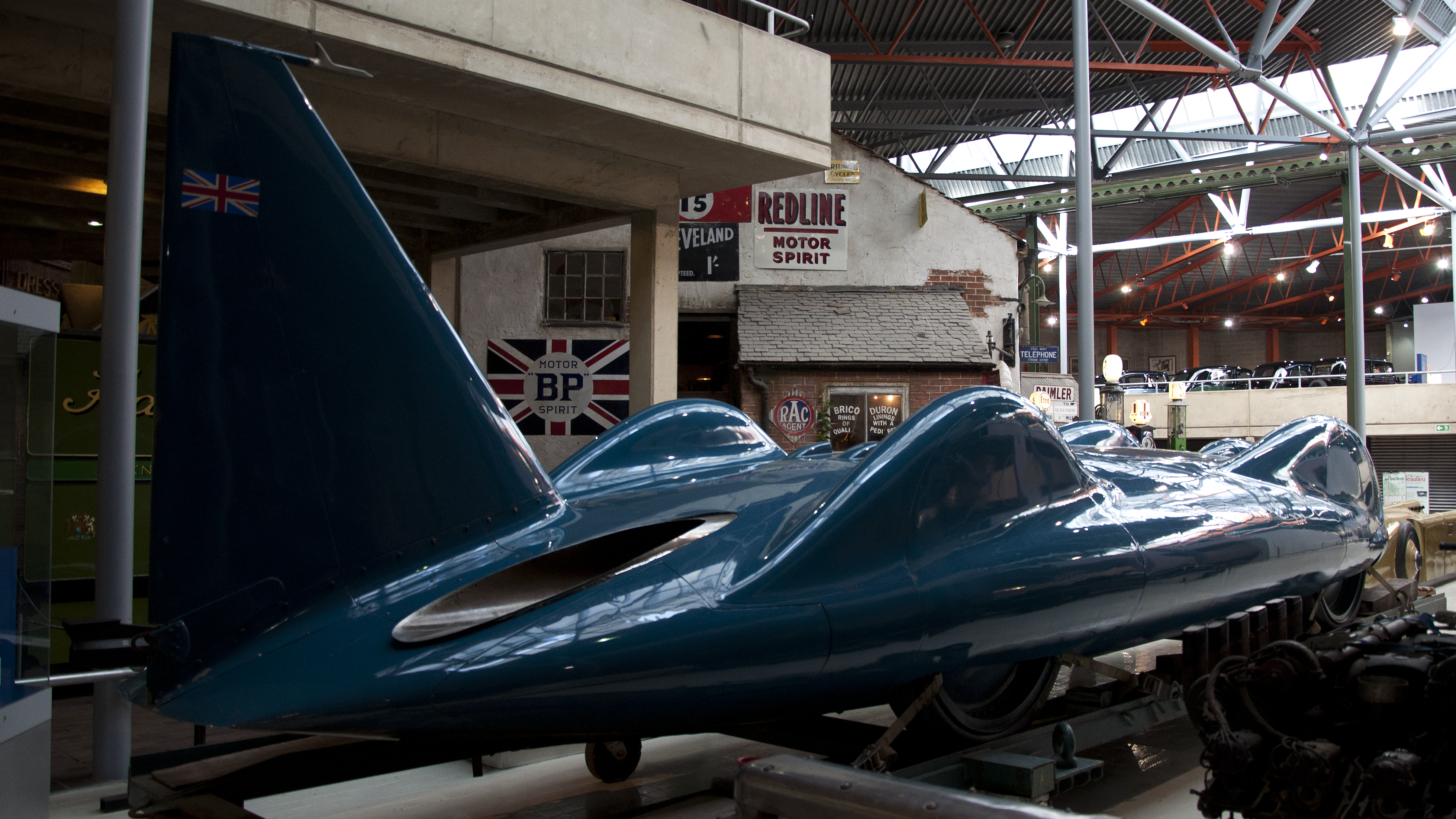 De Bluebird-Proteus CN7 van Donald Campbell in het National Motor Museum, Beaulieu, Engeland